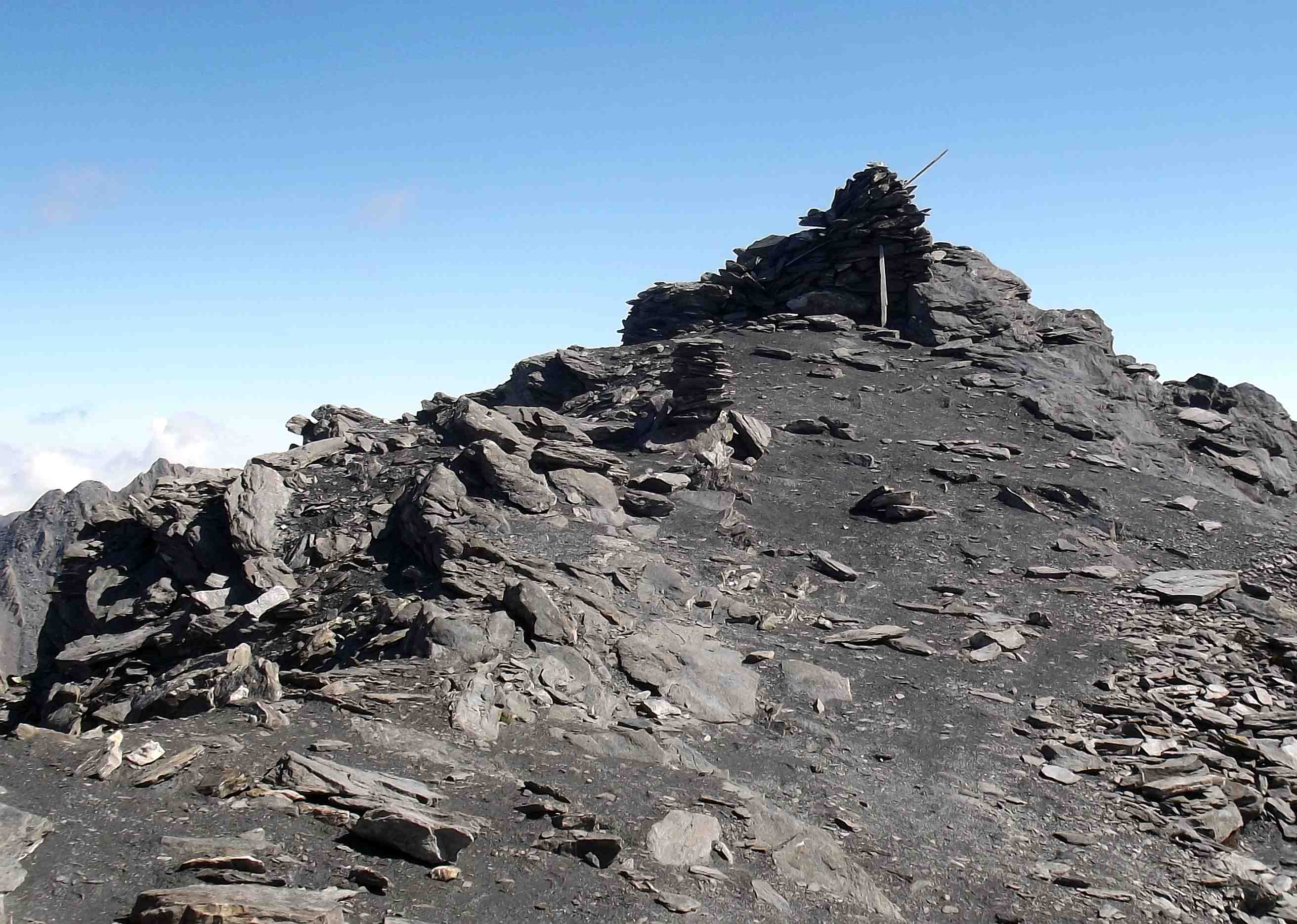 La Punta Merciantaira (Alpi Cozie, confine italo-francese)